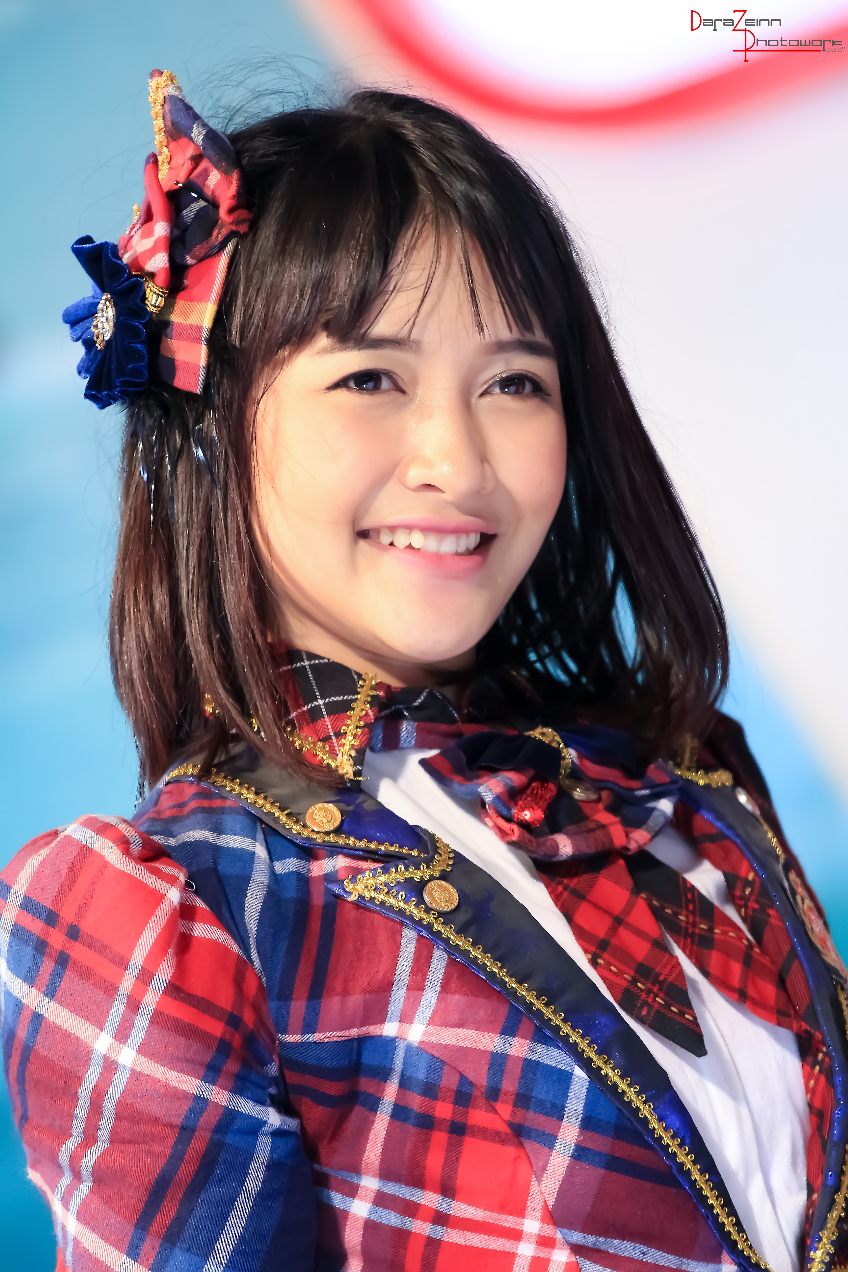 Devi Kinal Putri